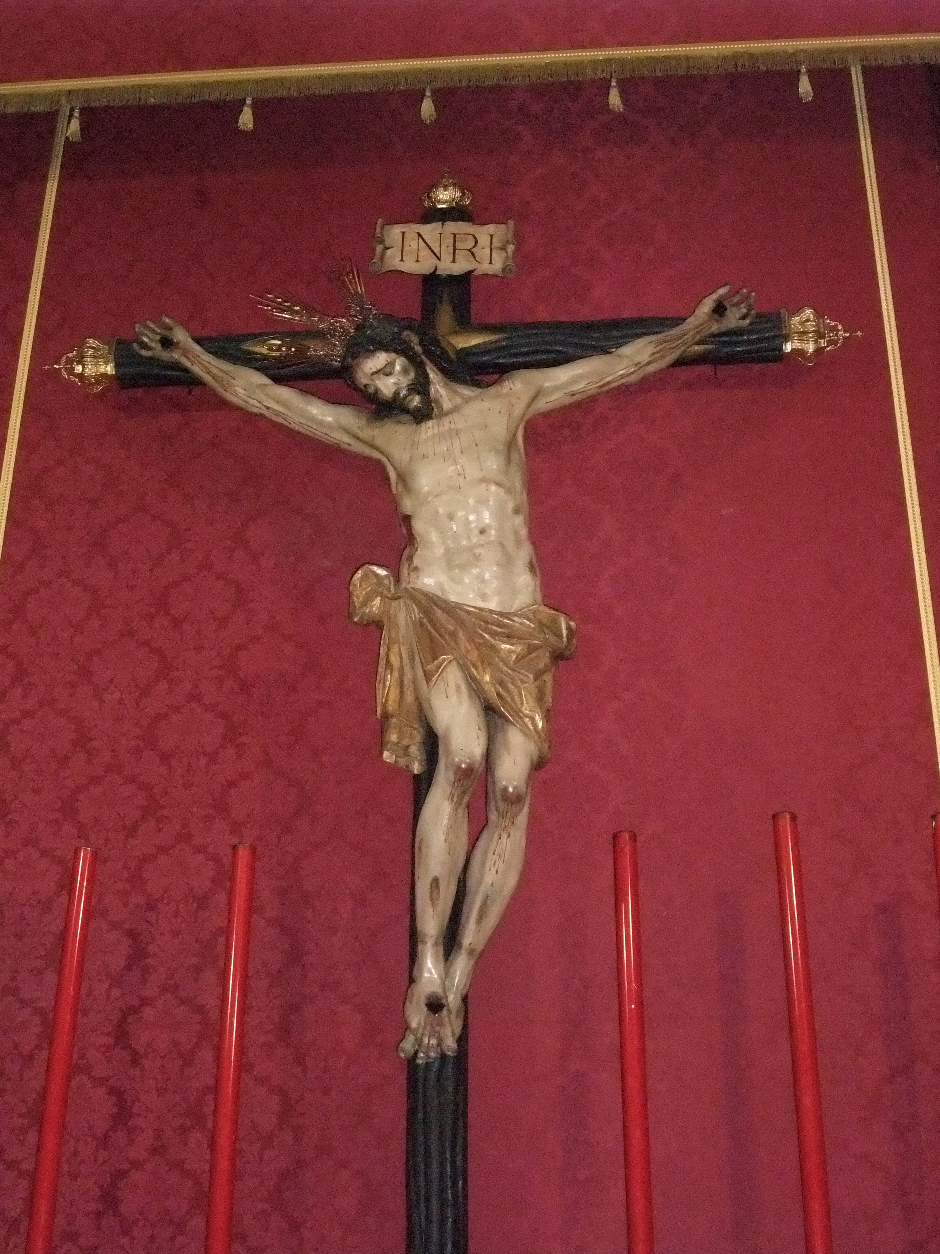 Granada-Iglesia de San Cecilio-4-Cristo de los Favores (Pablo de Rojas, siglo XVII)